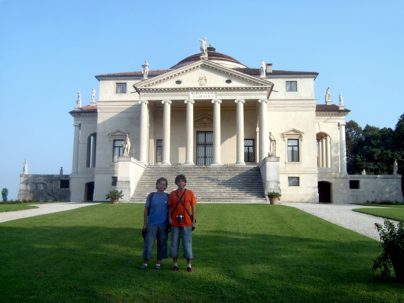 Villa Capra "La Rotonda", Andrea Palladio, Vicenza, Italy.